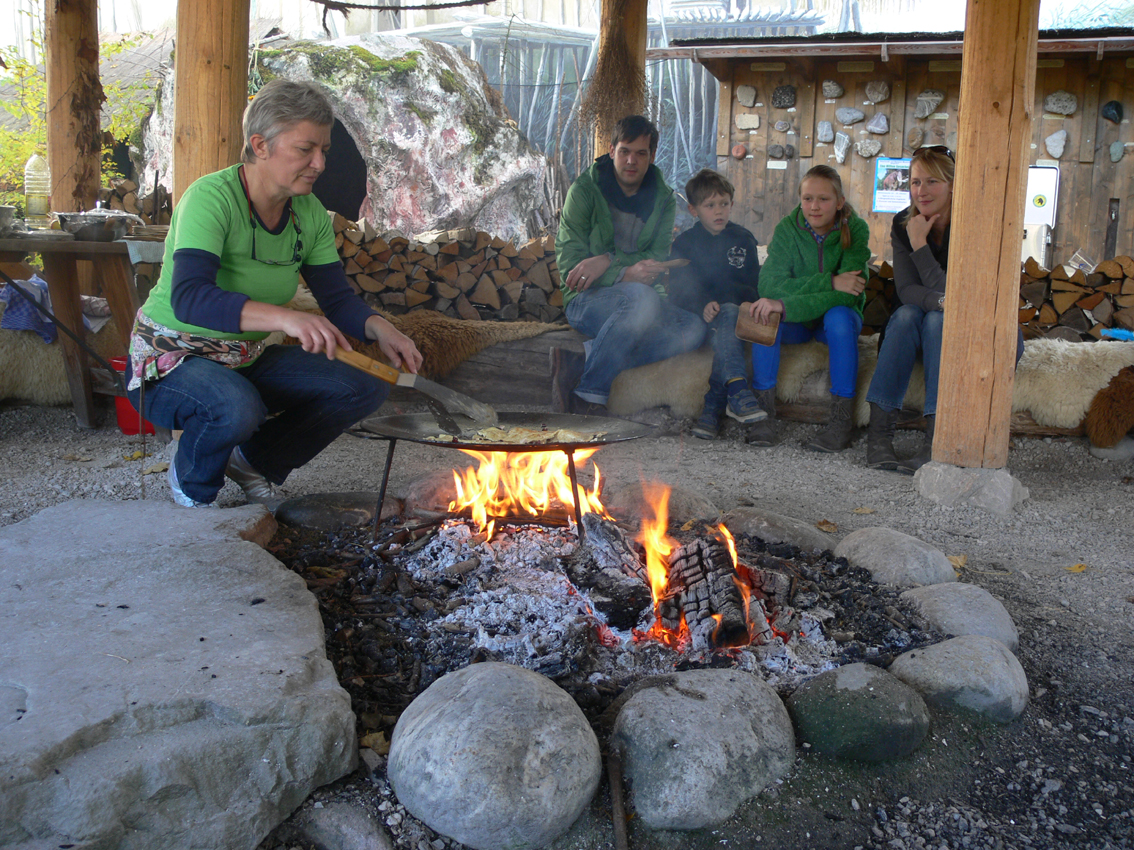 Spezielle Familienangebote wie die Steinzeitküche finden reges Interesse bei den Besuchern.